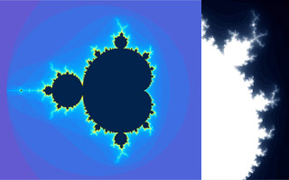 Mandelbrotmängden, en fraktal.